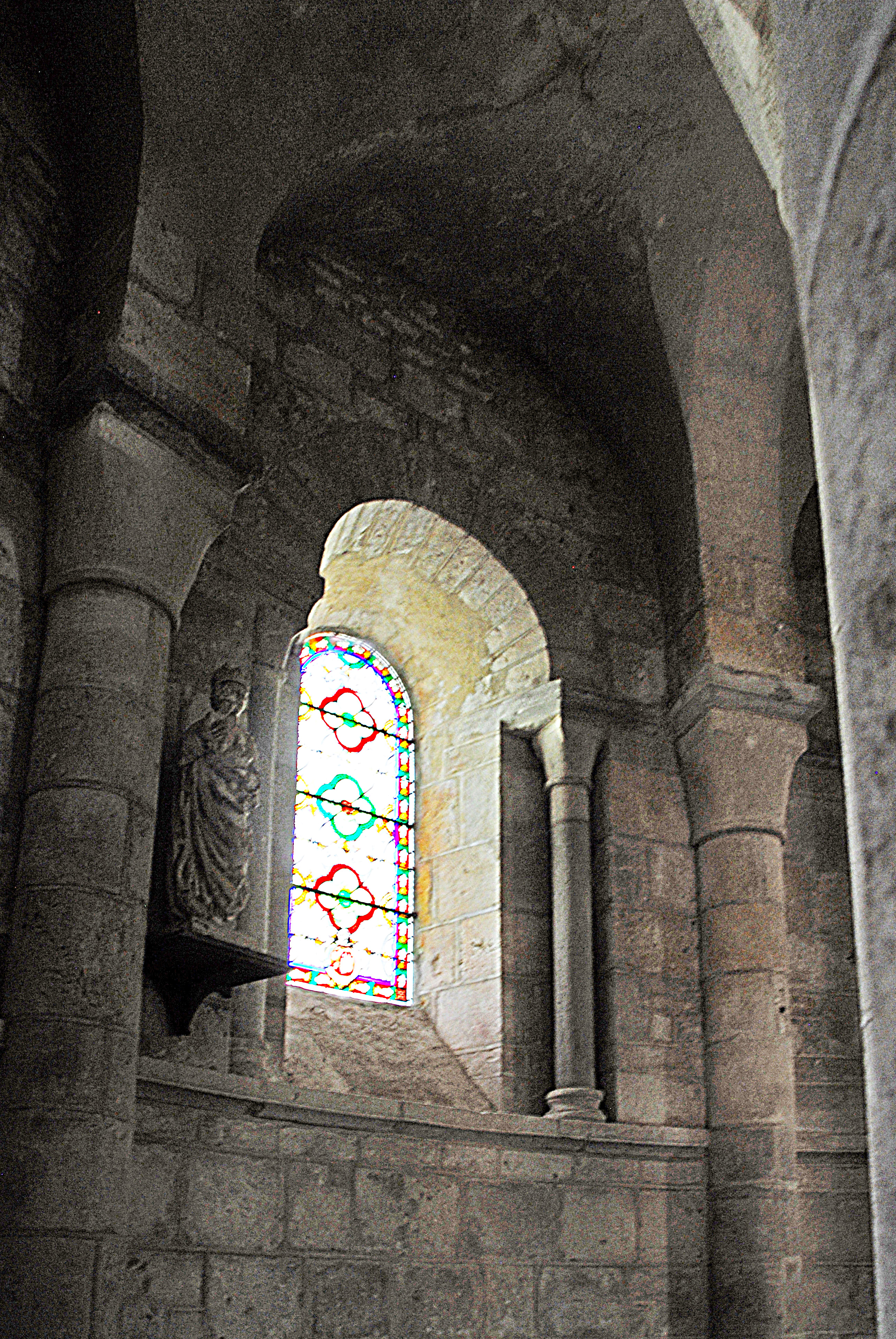 Ste-Croix de Veauce, Fenster Chorumgang